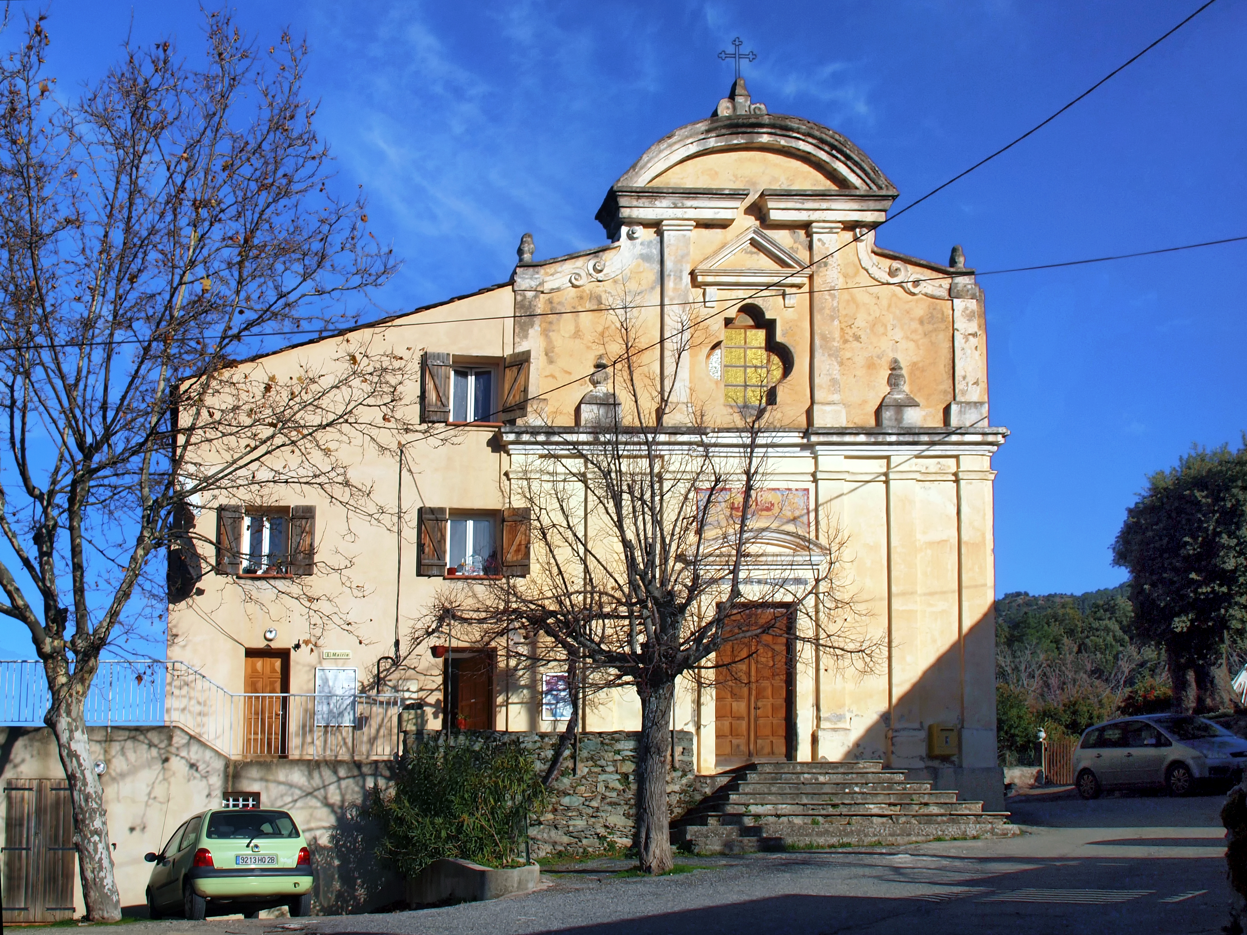 Gavignano, Castagniccia (Haute-Corse) - La mairie attenante à l'église paroissiale de l'Annonciation, à Olmi.